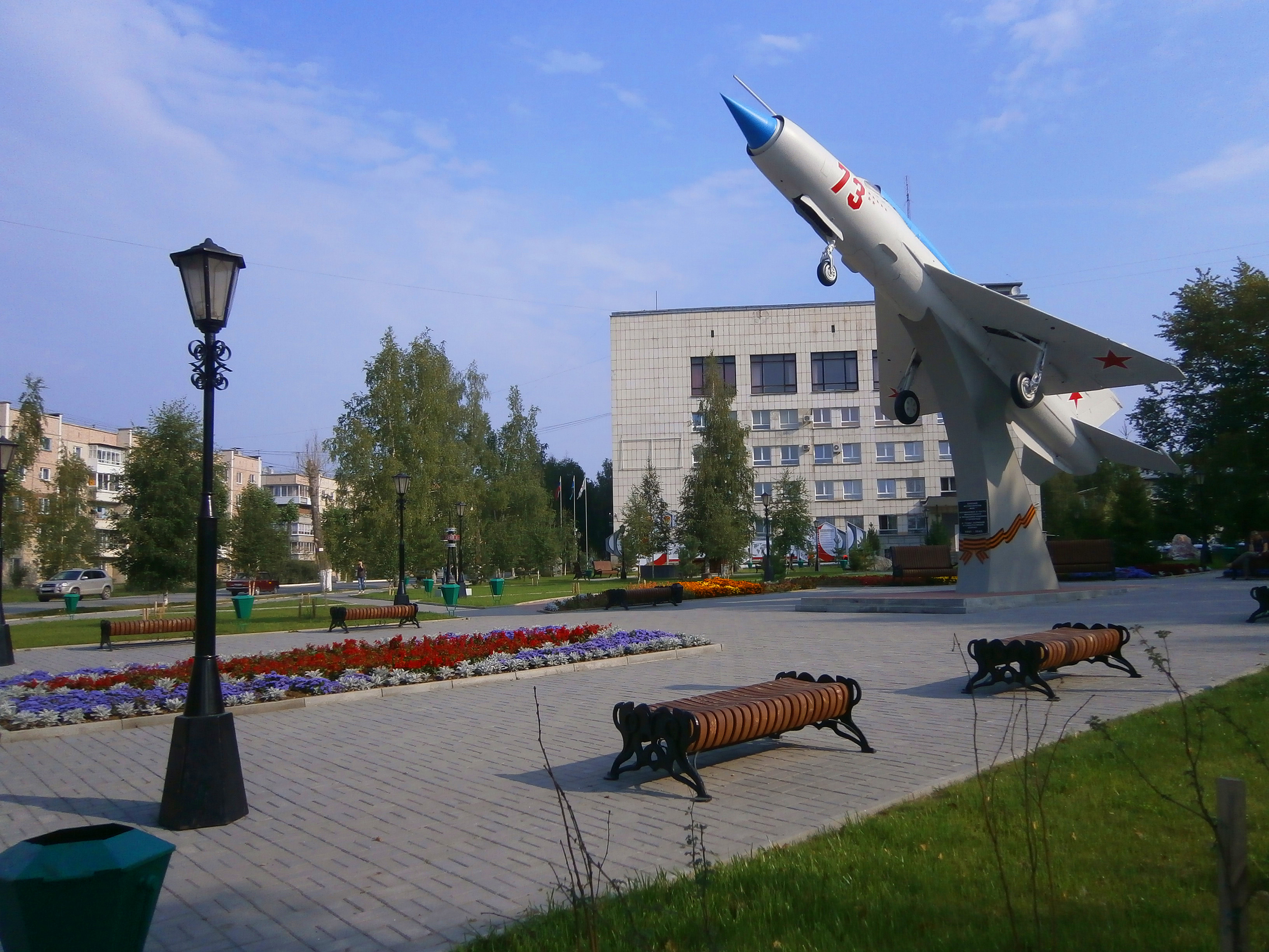 Символ города